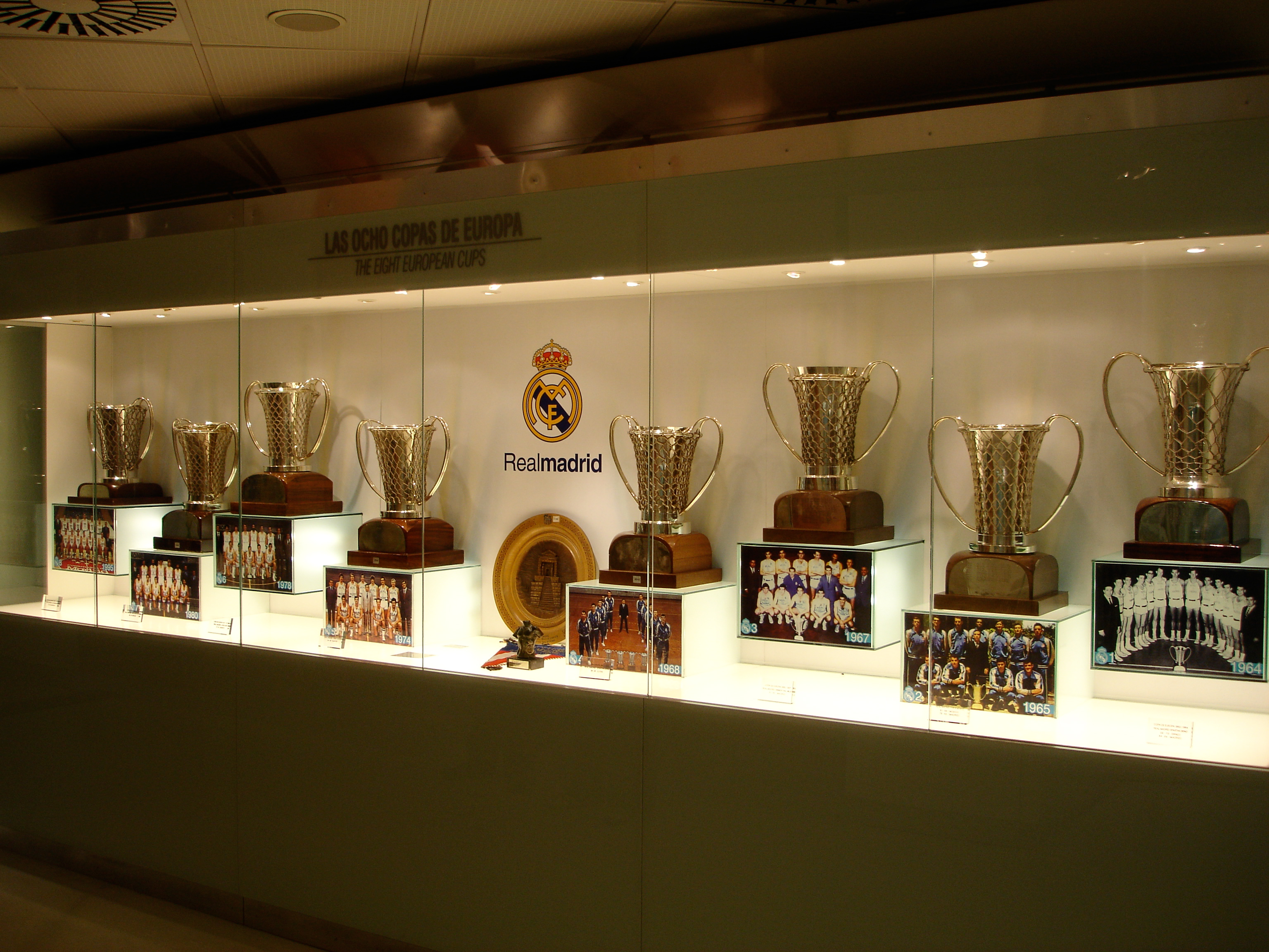 Club memorabilia